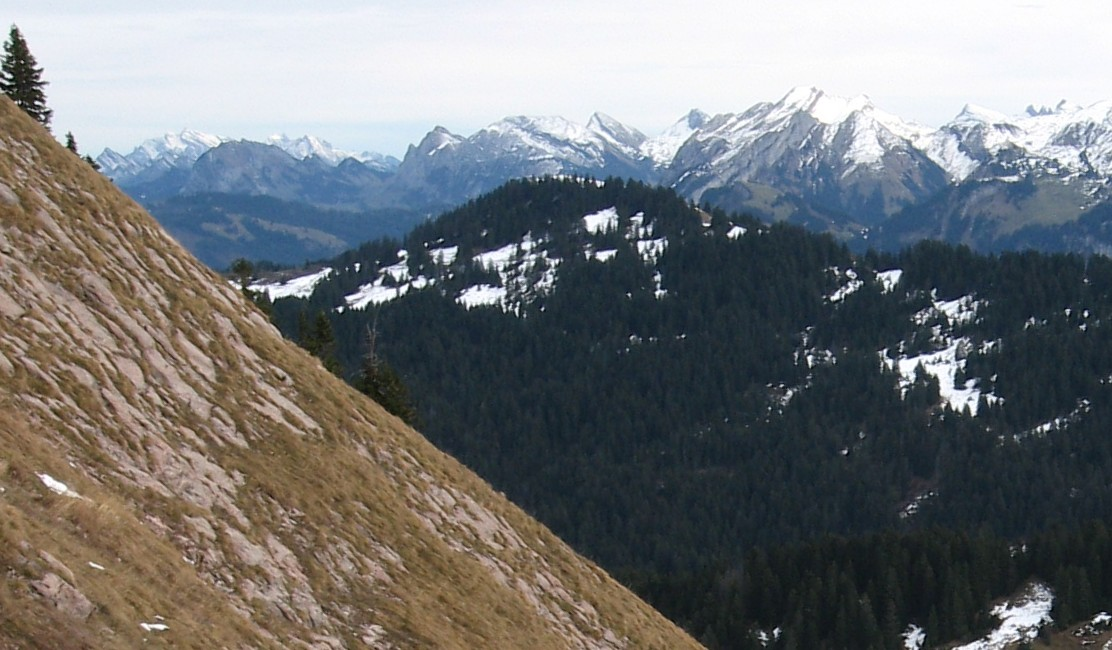 Furggelenstock von Westen